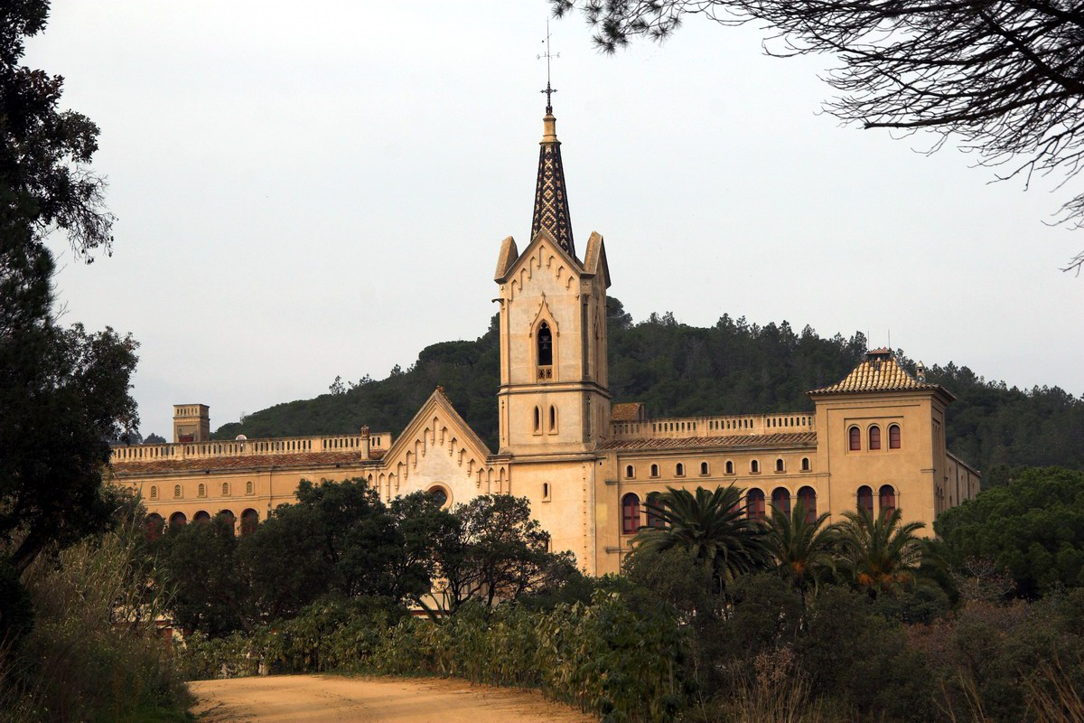 Santuari de Sant Pere del Bosc (Lloret de Mar-La Selva-Catalunya). Originari del s.XII, va ser modificat al s.XVII i novament reformat per Josep Puig i Cadafalch al 1898 per encàrrec de Nicolau Font i Maig. Les escultures son d'Eusebi Arnau i la pintura de l'església d'Enric Monserdà.